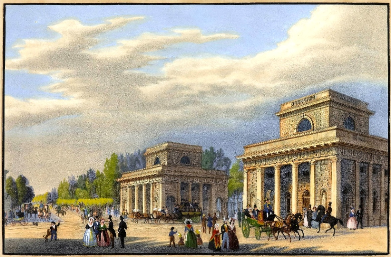 Porta Venezia in un ciclo di illustrazioni